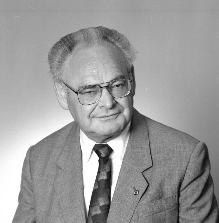 ADN-ZB/Schöps/25.7.89/Berlin: Walter Halbritter; Minister und Leiter des Amtes für Preise beim Ministerrat der DDR; Mitglied des ZK der SED.